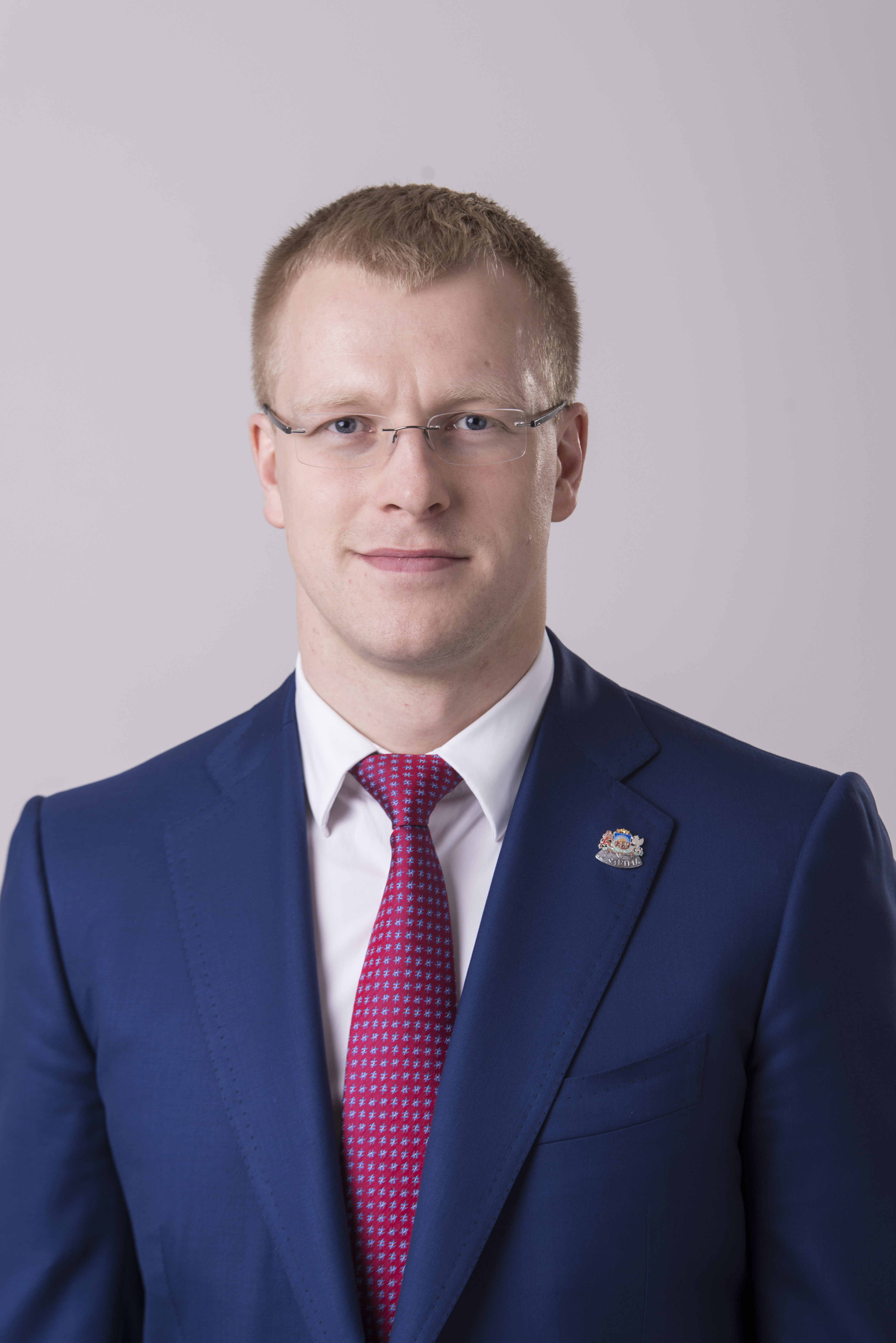 2014.gada 9.decembris. 12.Saeimas deputāts Andrejs Elksniņš. Foto: Reinis Inkēns, Saeimas Kanceleja Izmantošanas noteikumi: saeima.lv/lv/autortiesibas